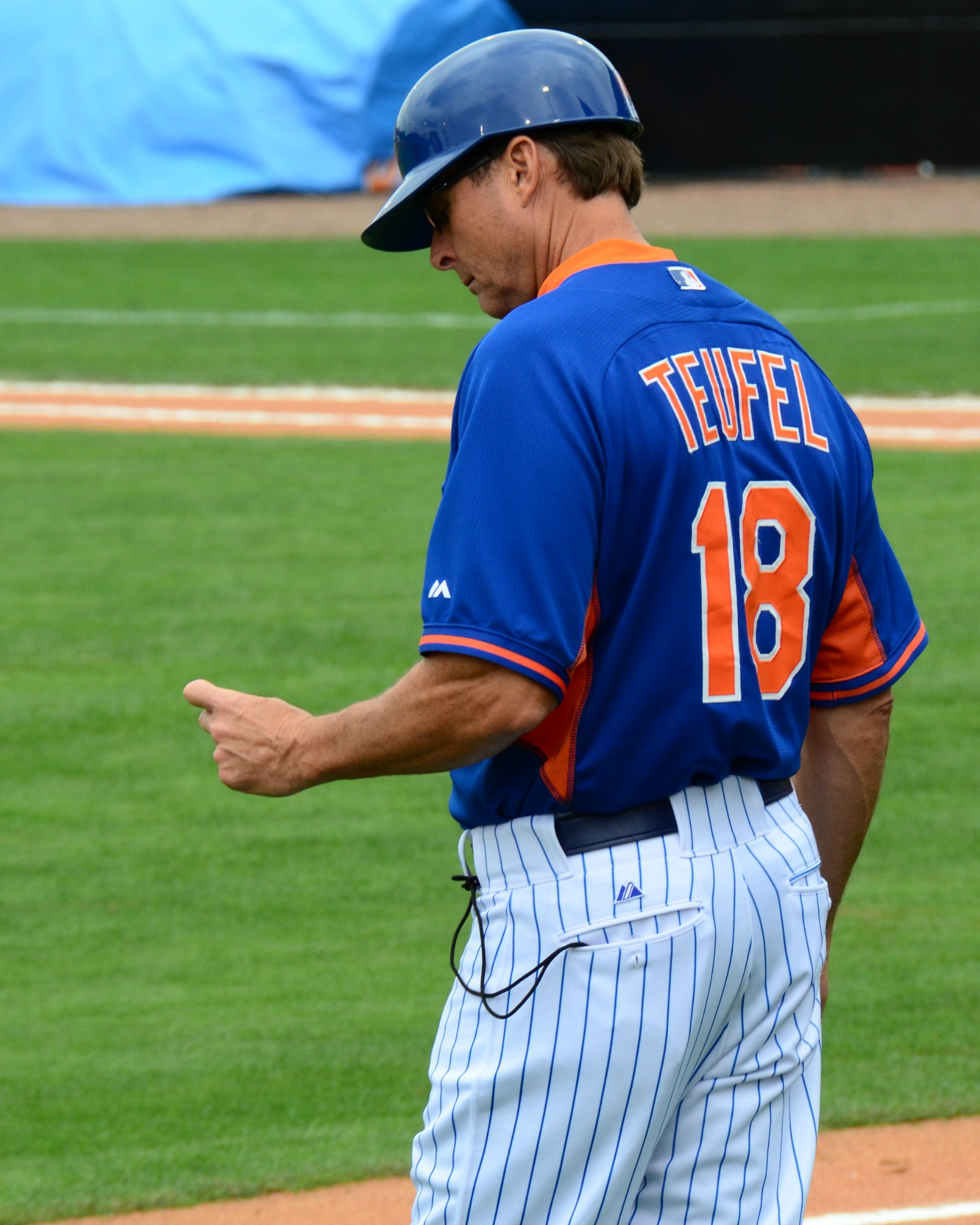 Tim Teufel